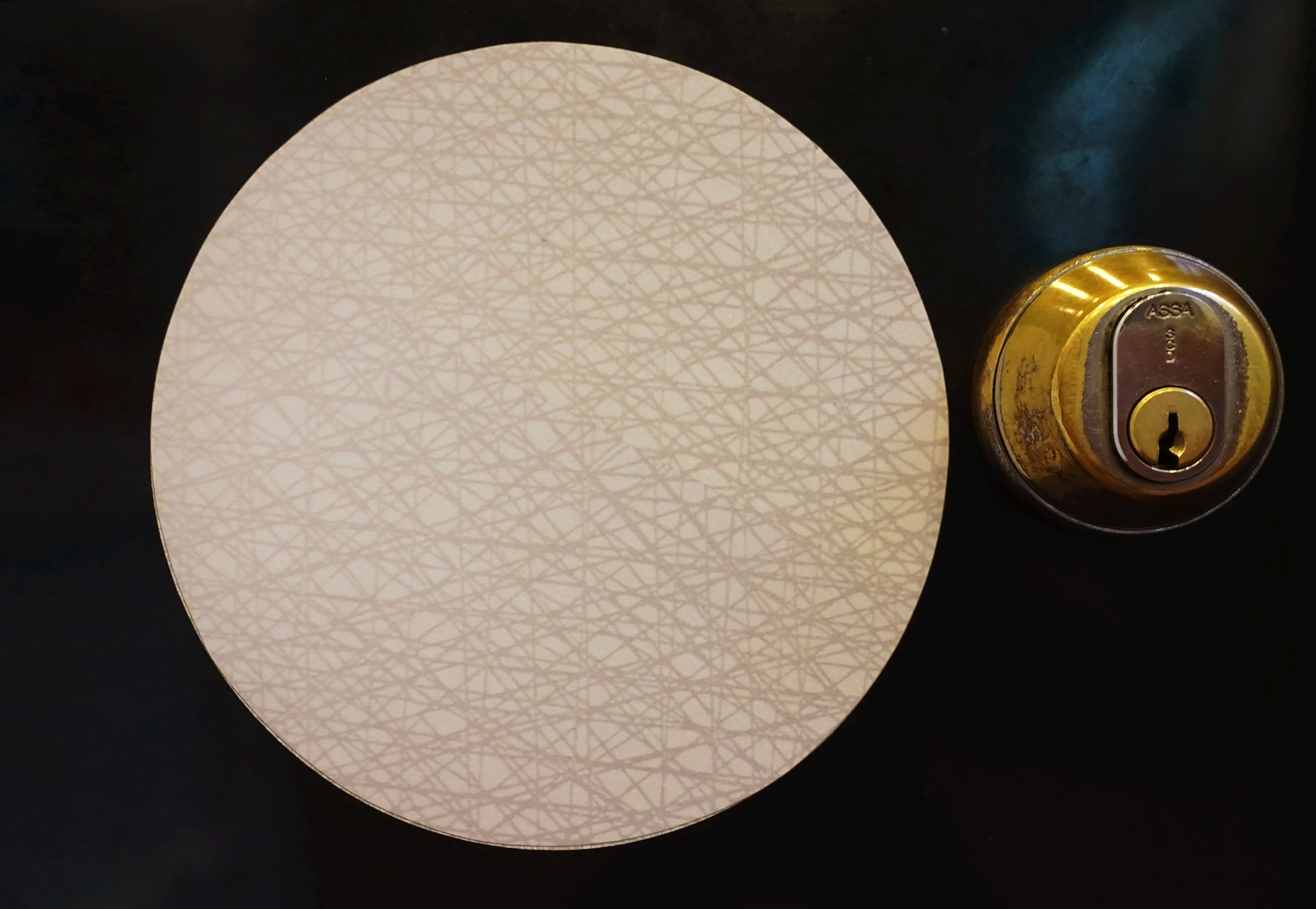 Plastlaminat med mönstret "Virrvarr" på tryckplatta för stationsdörrarna på Stockholms tunnelbana (utställd på Spårvägsmuseet).